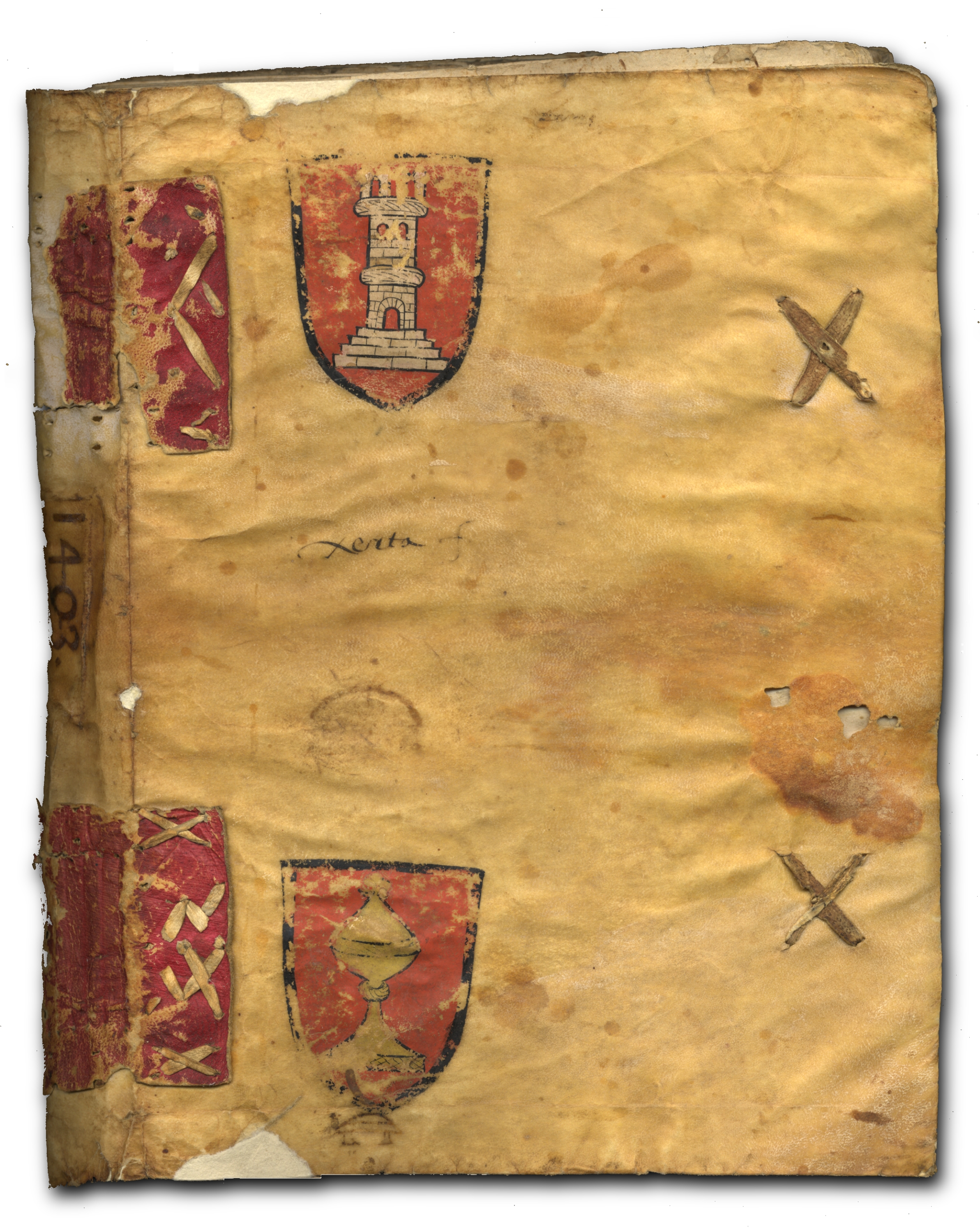 El Llibre de Clavaria de 1403-1404 és el corresponent a l’administració de Pere Macip que apareix amb la representació d’una copa. Entremig dels dos escuts, un petit dibuix mig esborrat d’un pont fa referència al notari escrivà: Jaume dez Pont.